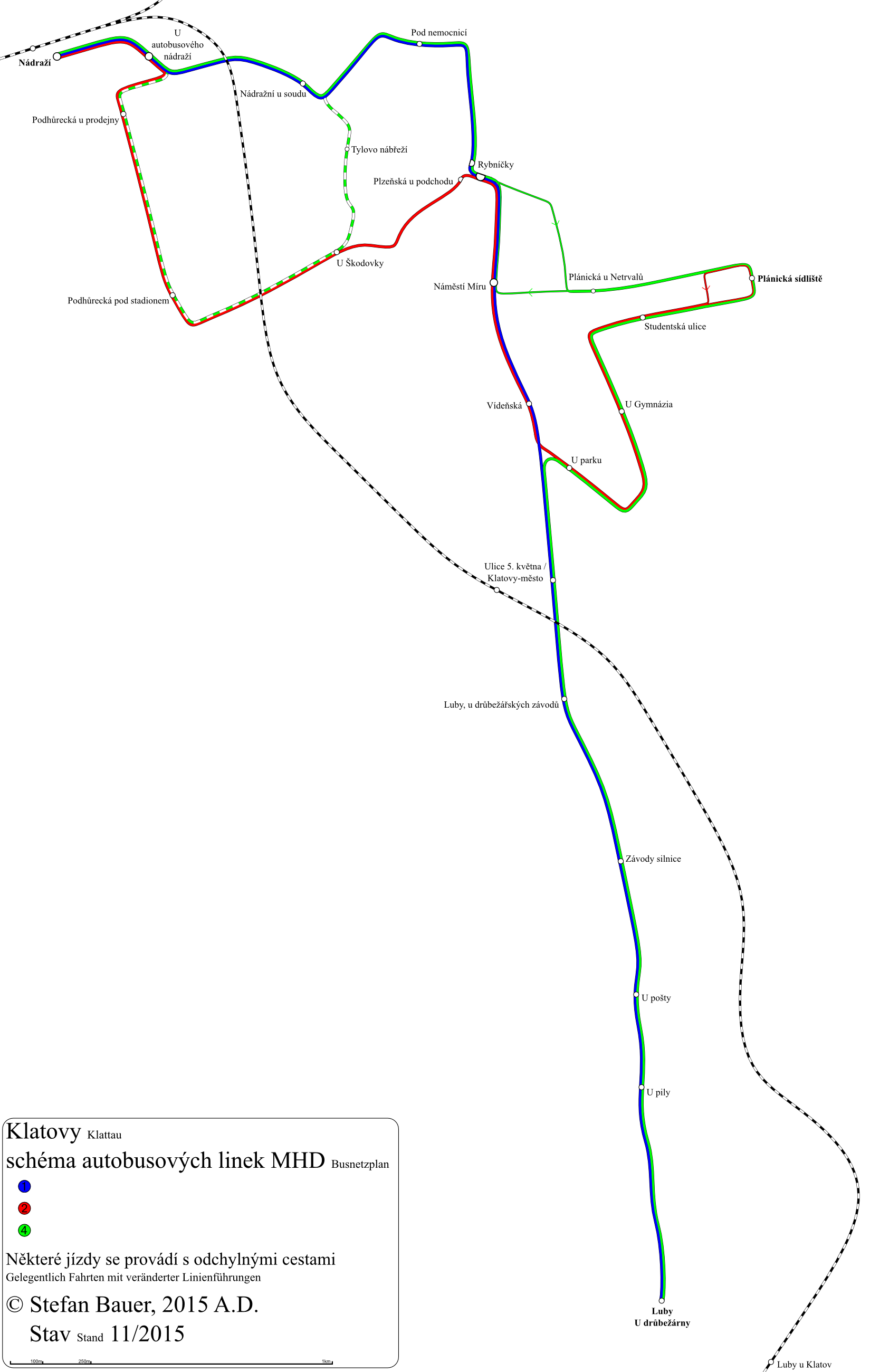 Mapa autobusové sítě v Klatovech 2015 (linky MHD)